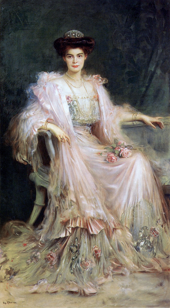 Crown Princess Cecilie of Prussia (1886-1954), née Duchess of Mecklenburg-Schwerinlabel QS:Len,"Crown Princess Cecilie of Prussia (1886-1954), née Duchess of Mecklenburg-Schwerin" label QS:Lhu,"Cecília porosz és német trónörökös hercegné, született mecklenburg–scwerini hercegnő." label QS:Lde,"Kronprinzessin Cecilie von Preußen, geboren Herzogin zu Mecklenburg-Schwerin."